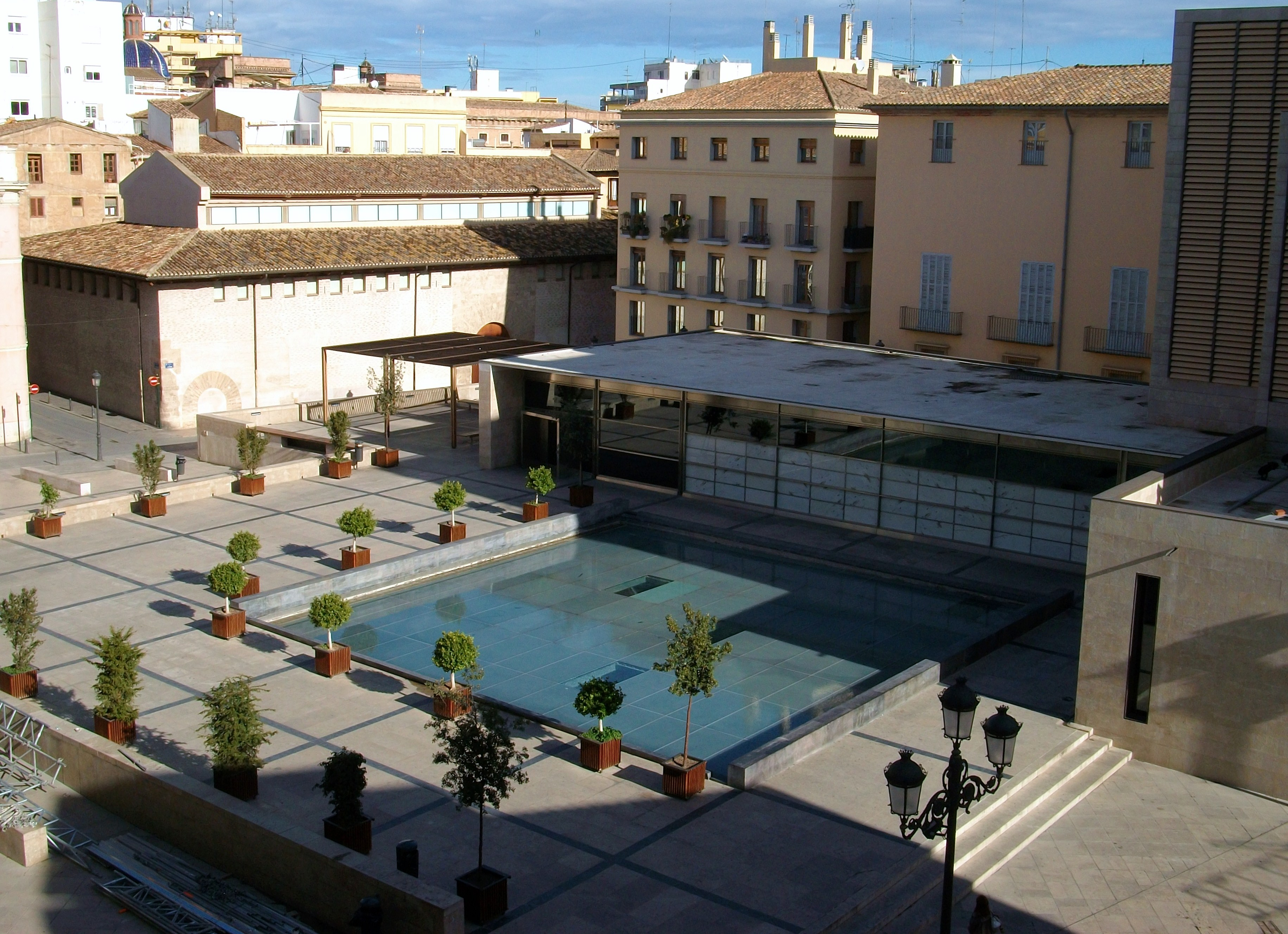 Plaça de l'Almoina des de la Catedral de València, a sota està el centre Arqueològic de l'Almoina.